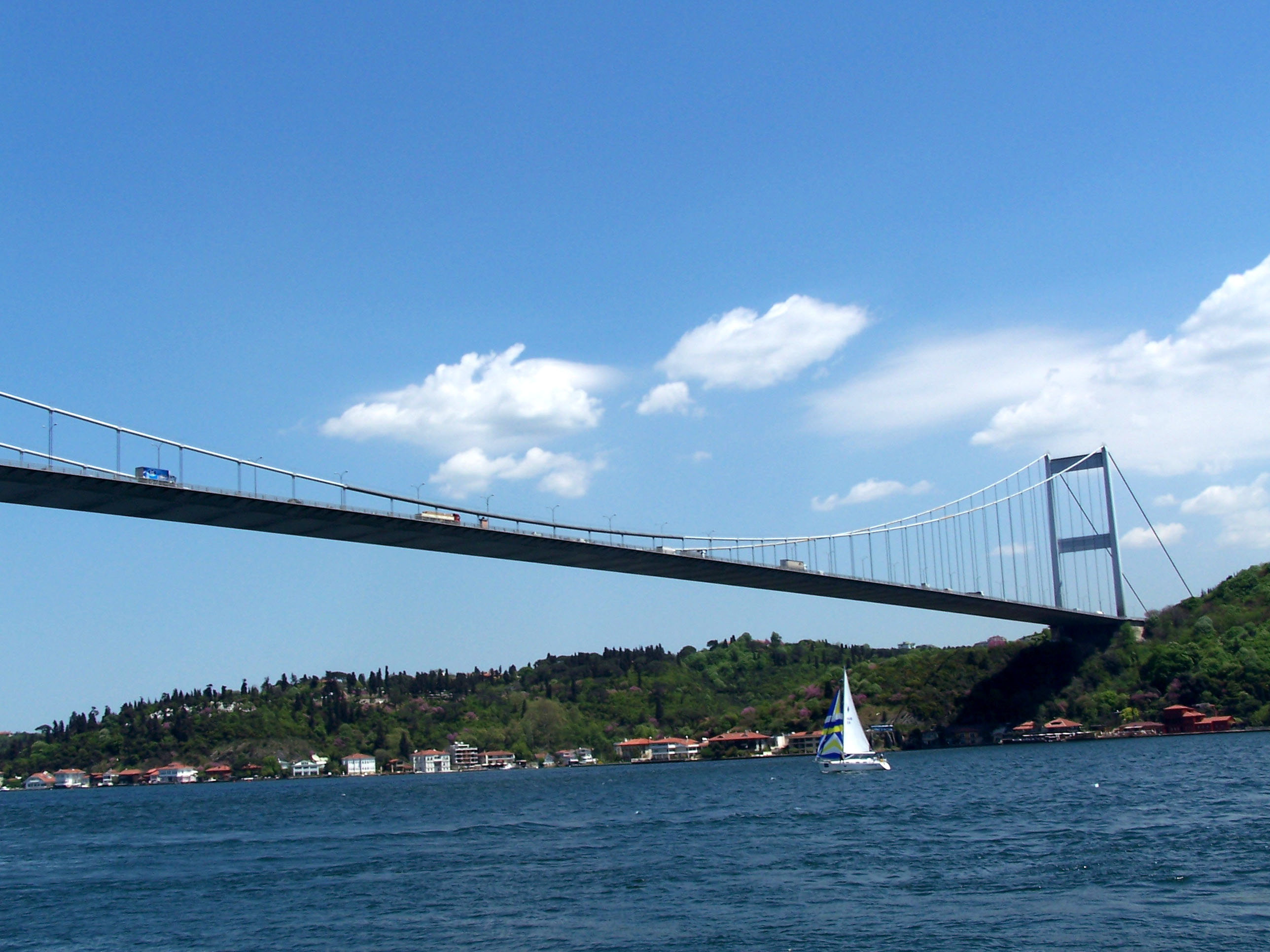 Fatih Sultan Mehmet Köprüsü